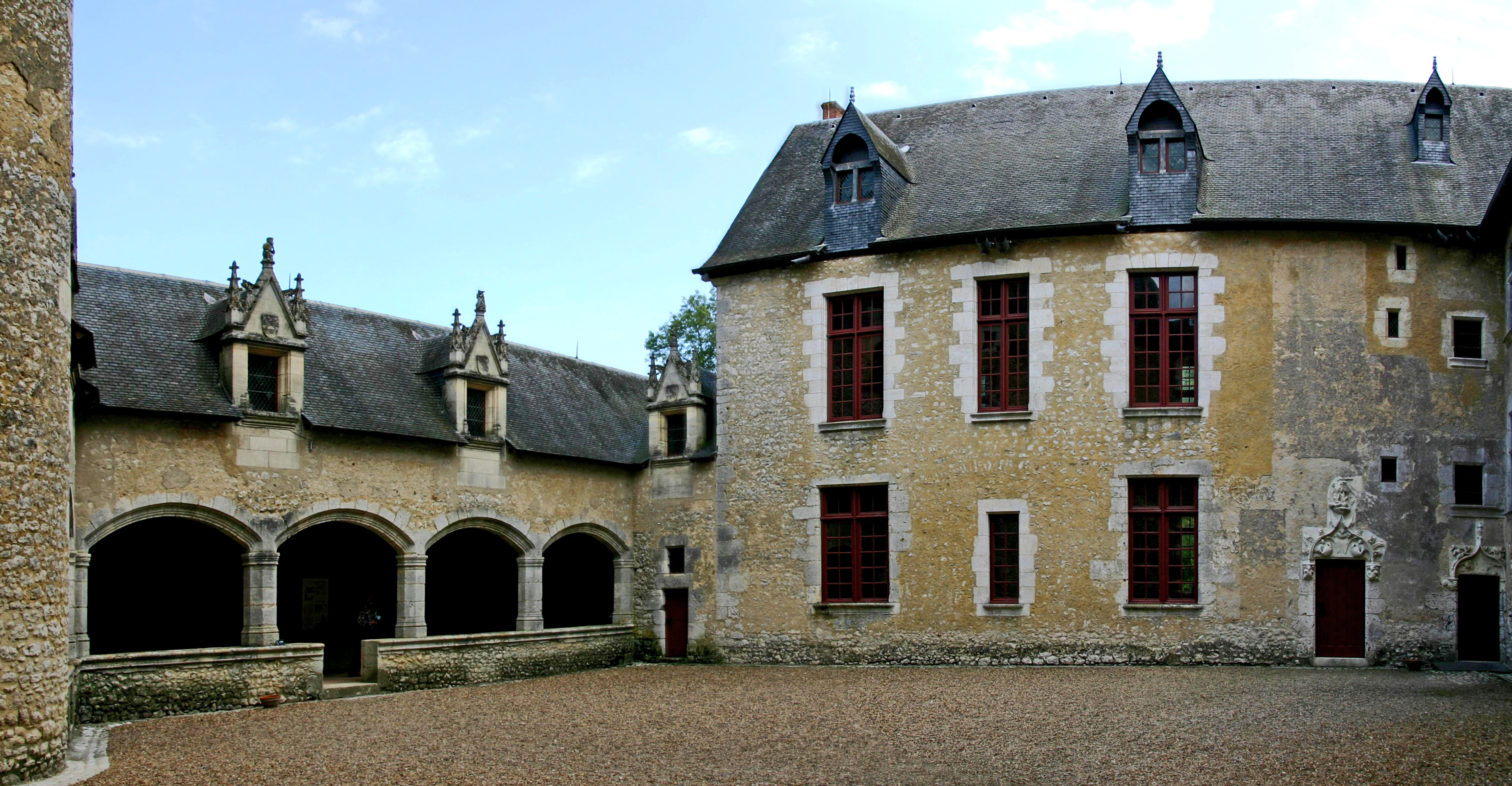 Schloss Fougères-sur-Bièvre